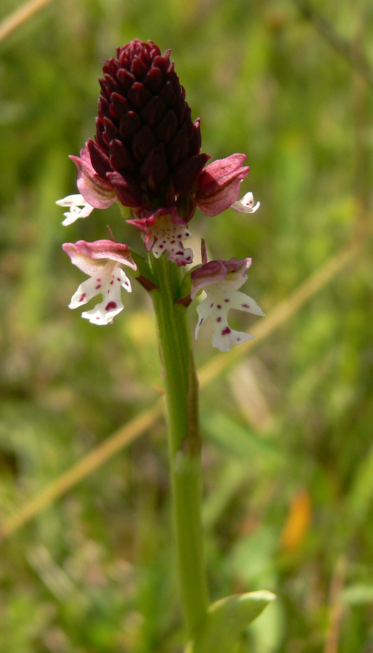 Esivere, Läänemaa